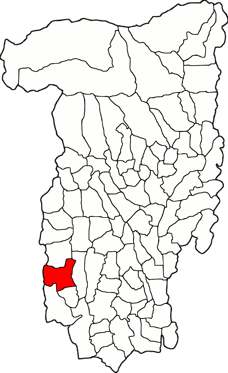 Lage der Gemeinde Zătreni im Kreis Vâlcea (RO).